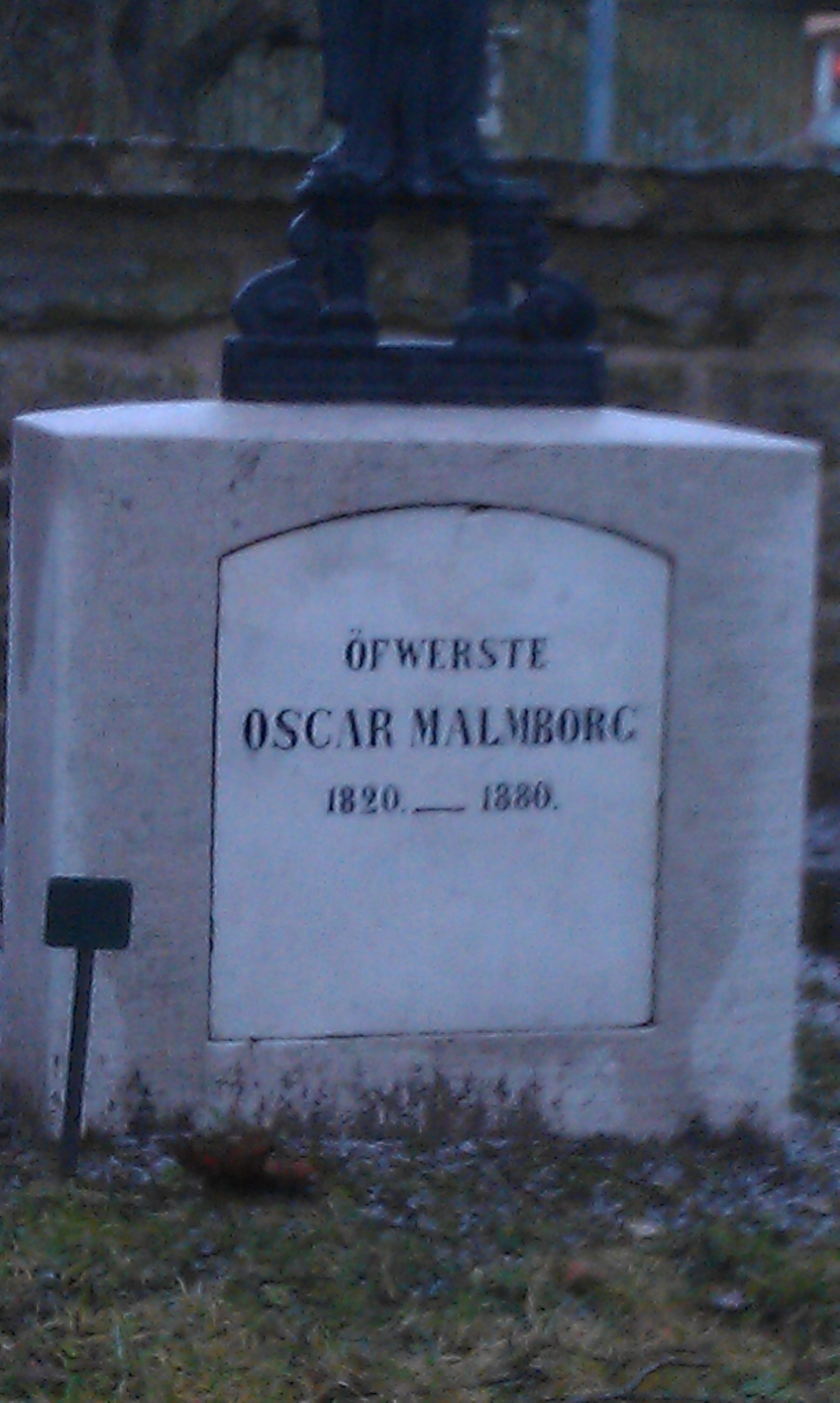 Oscar Malmborg, gotlänning som tjänstgjorde som överste under amerikanska inbördeskriget. Foto av gravsten i Visby.